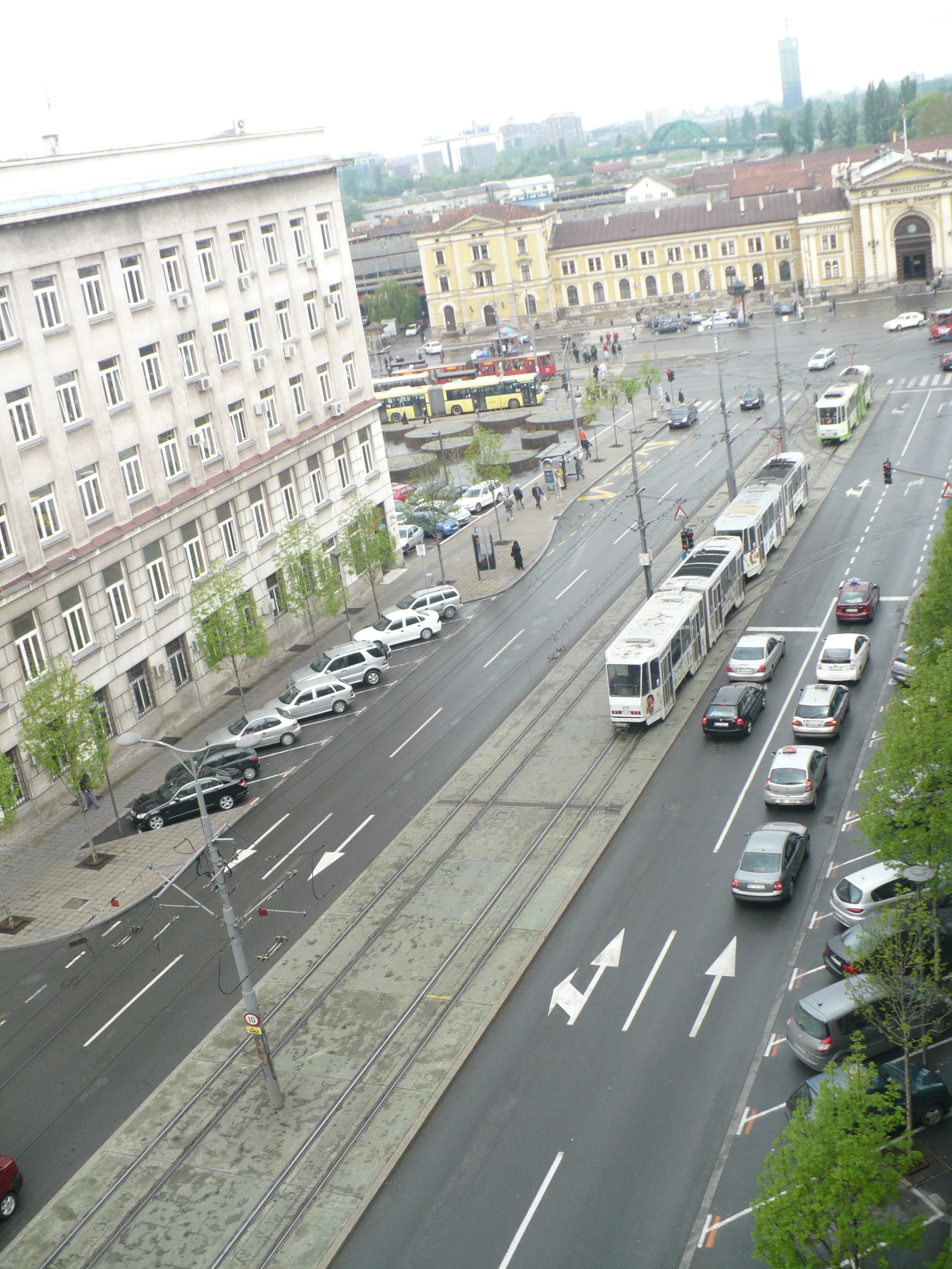 Belgrad'tan bir görüntü